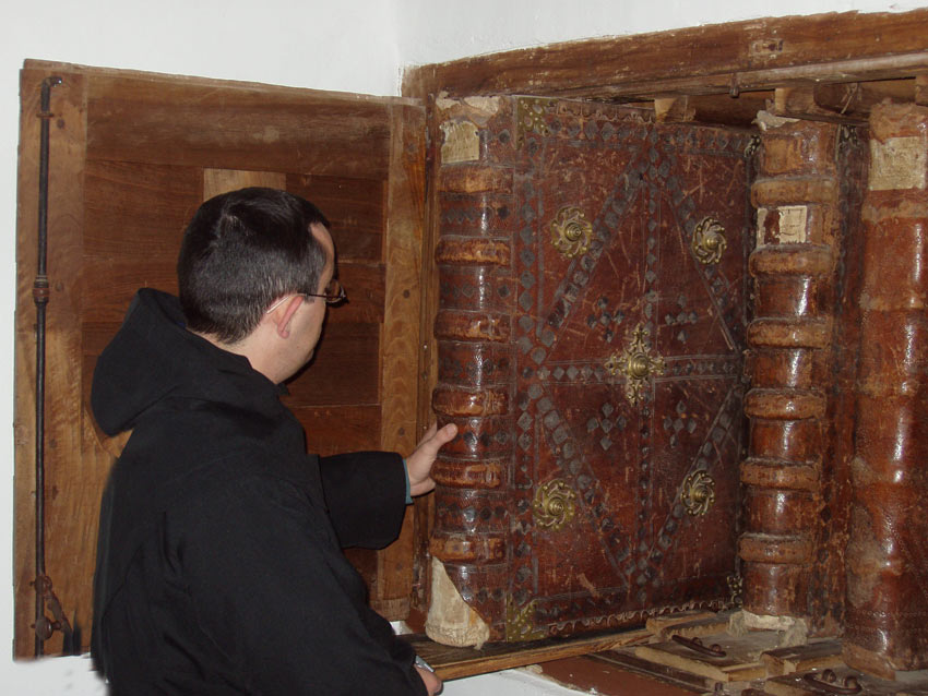 Cantorales del monasterio de San Millán de la Cogolla (La Rioja, España), patrimonio de la humanidad.